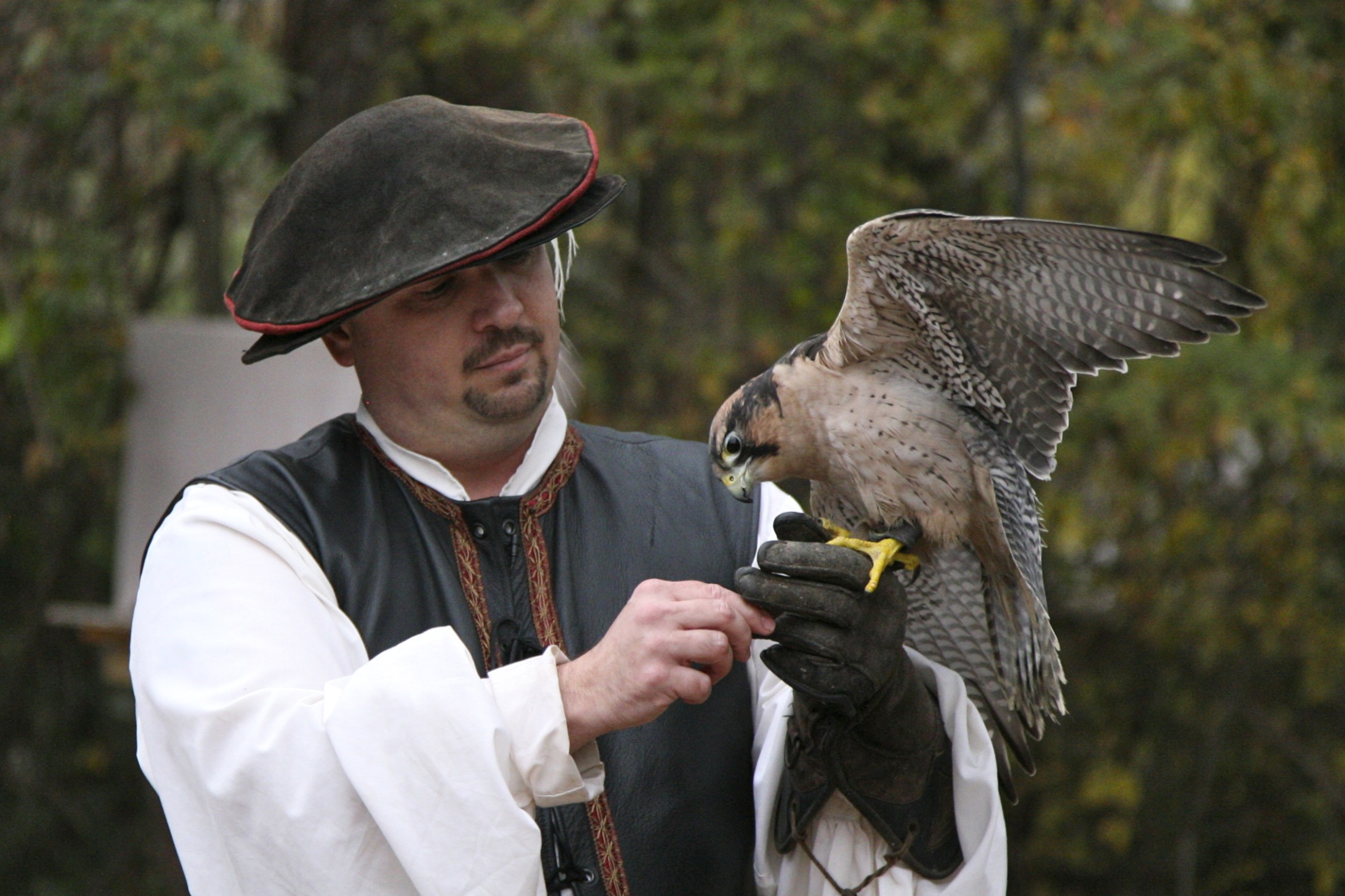 Renaissance Festival 2008